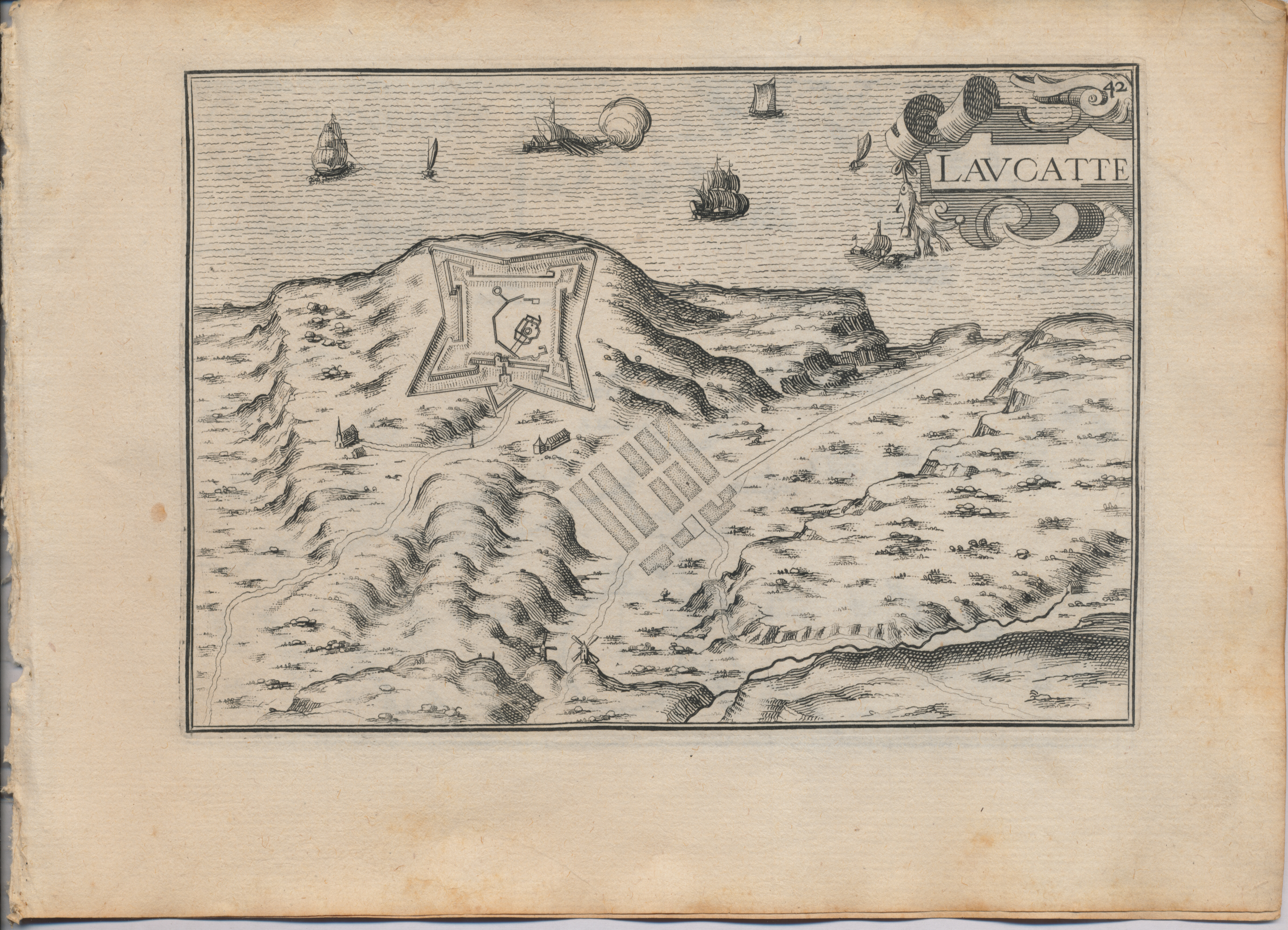 Gravure extraite de "Les Plans et Profils de toutes les principales villes et lieux considérables de France. par le Sieur TASSIN, géographe ordinaire de sa Majesté. A paris, Chez Melchior Tavernier, en l'Isle du Palais. 1634" (Province de Languedoc)